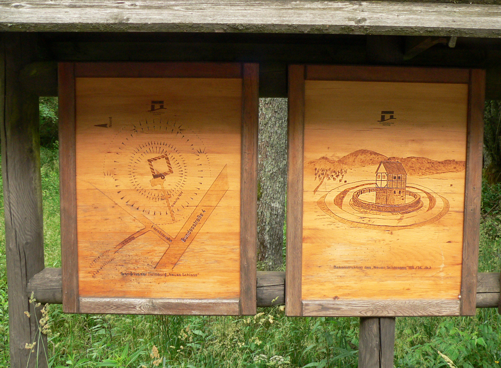 Tafel an der Burgstelle Neuschloss